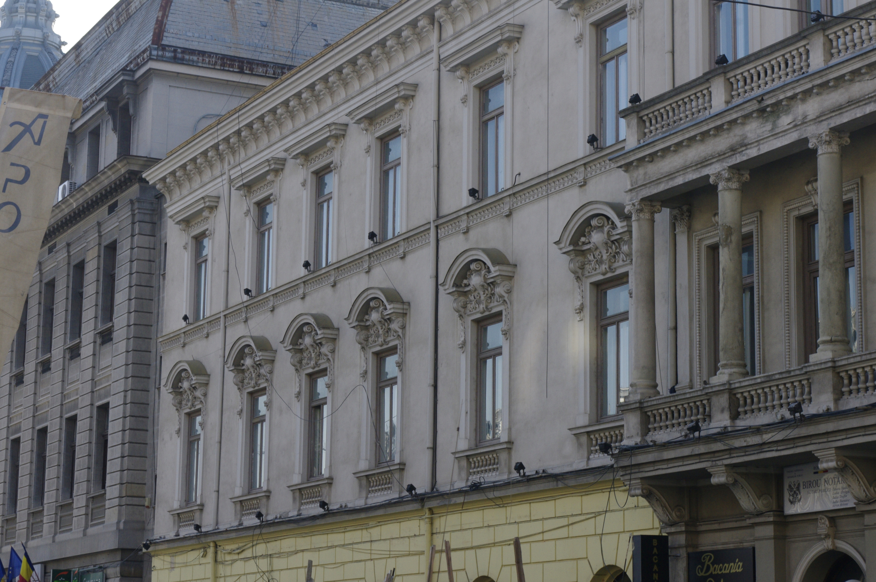 Imobil de raport